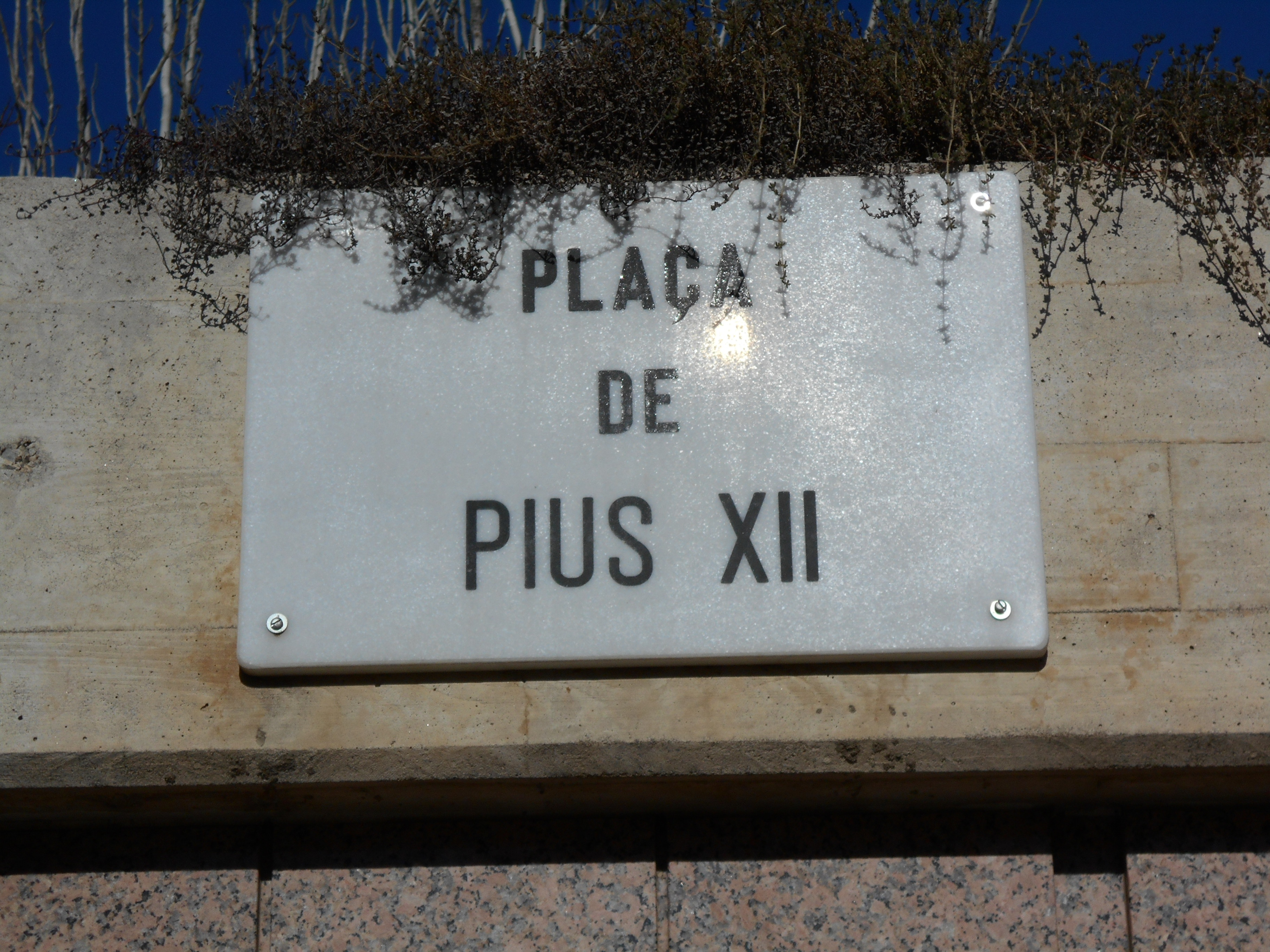 Plaza de Pío XII.